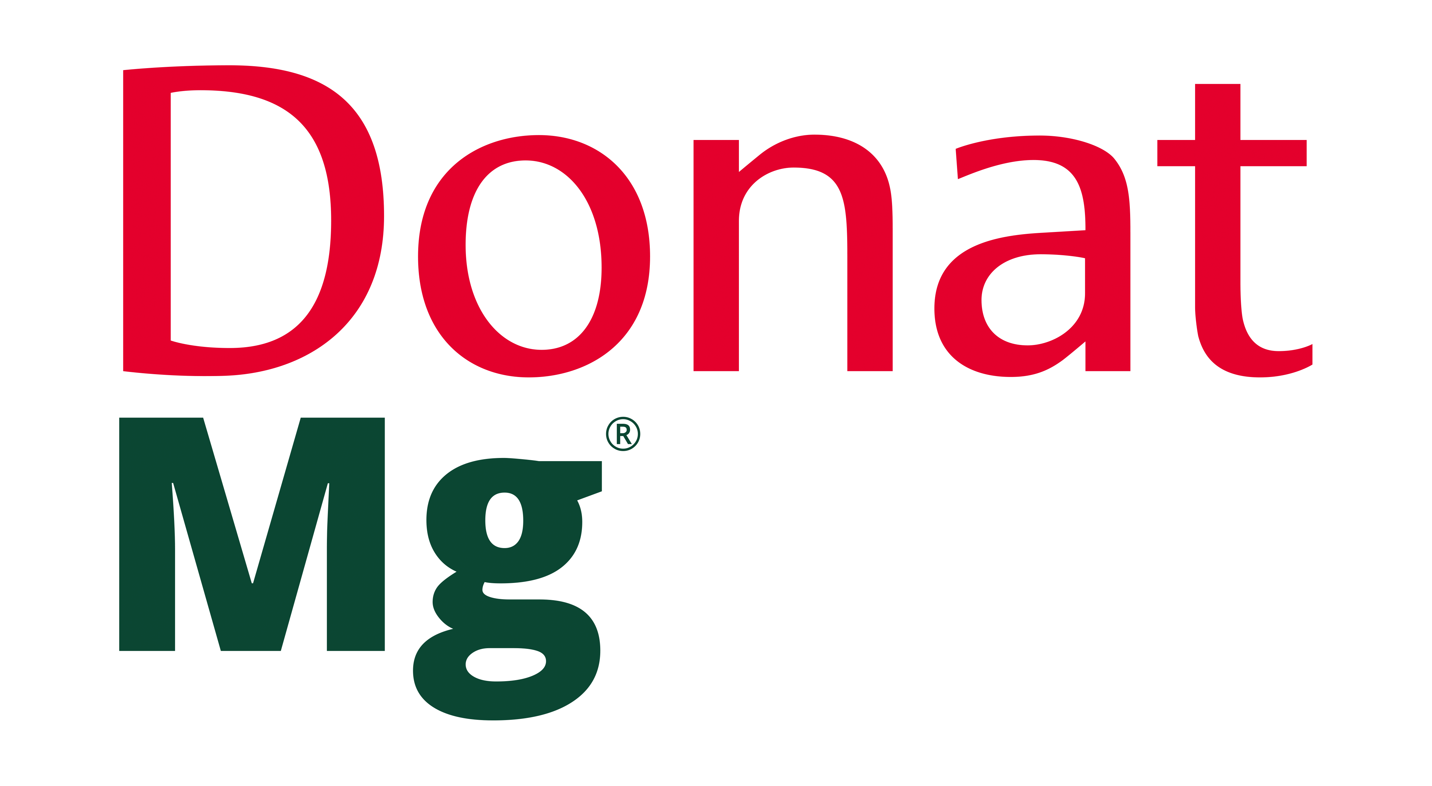 Logotip Donat Mg